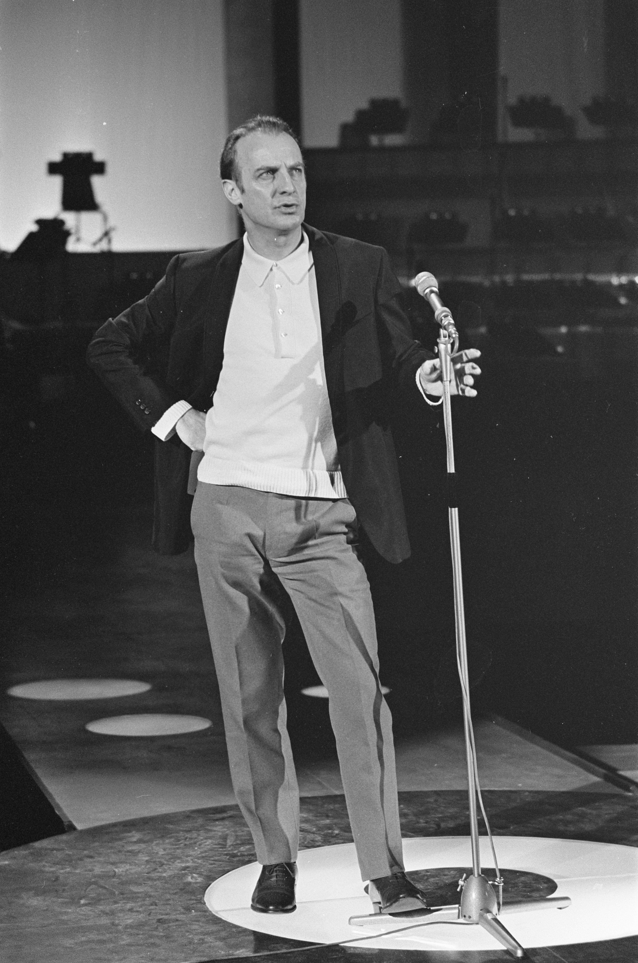 Collectie / Archief : Fotocollectie Anefo Reportage / Serie : Grand Gala du Disque 1968 Beschrijving : Grand Gala du Disque in RAI. Wim Sonneveld neemt conferences door Datum : 6 maart 1968 Locatie : Amsterdam Trefwoorden : artiesten Persoonsnaam : Sonneveld, Wim Fotograaf : Nijs, Jac. de / Anefo Auteursrechthebbende : Nationaal Archief Materiaalsoort : Negatief (zwart/wit) Nummer archiefinventaris : bekijk toegang 2.24.01.05 Bestanddeelnummer : 921-1400